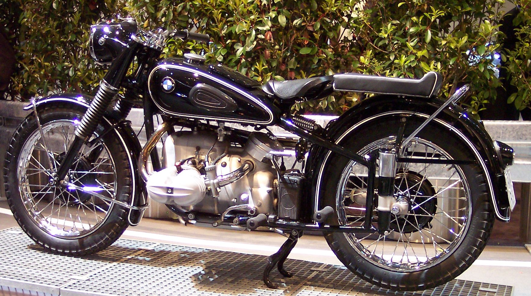 BMW R68